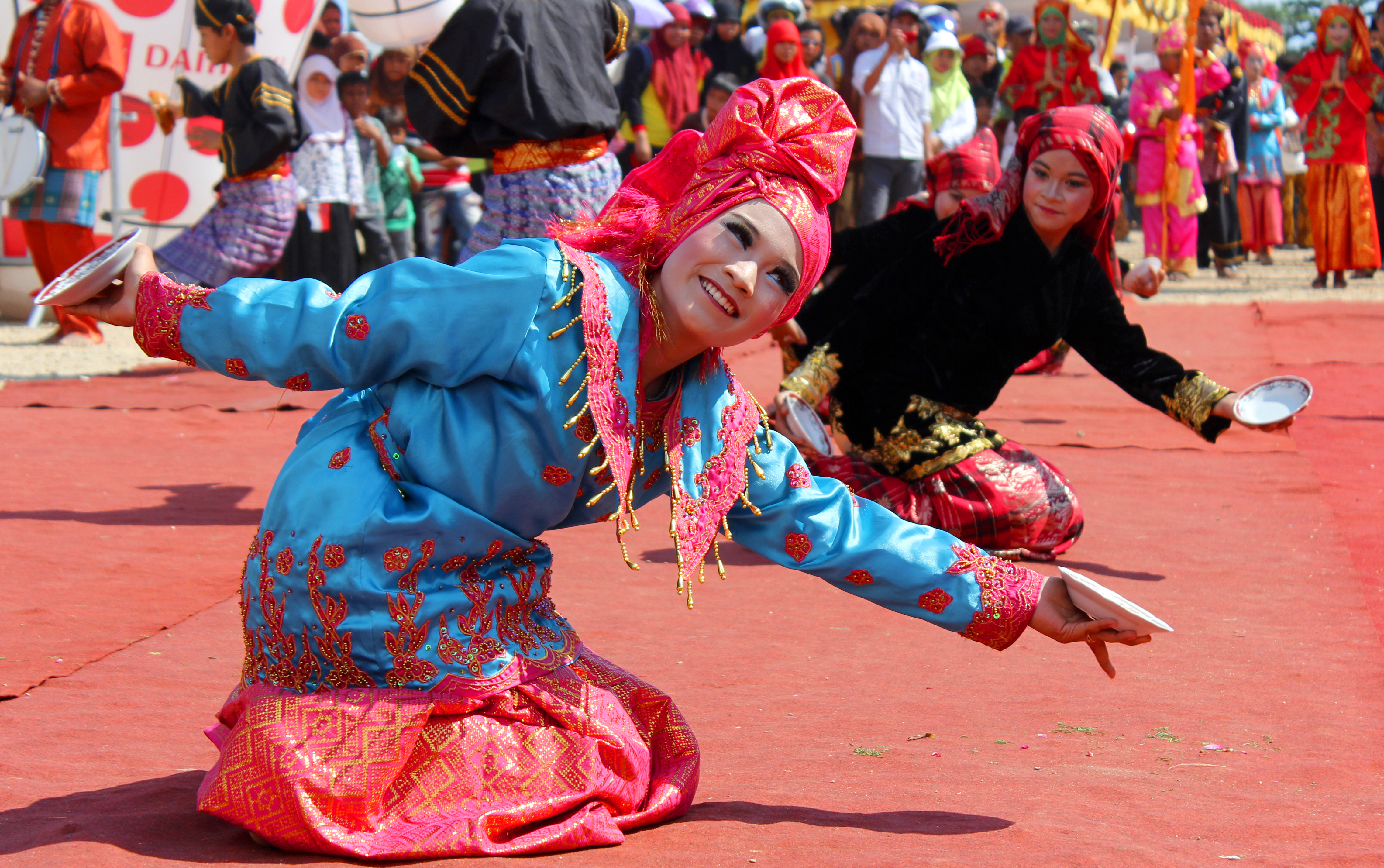 Tari piring, tarian khas Minangkabau, di suatu acara budaya di Painan, Kabupaten PesisirSelatan, Sumatera Barat.